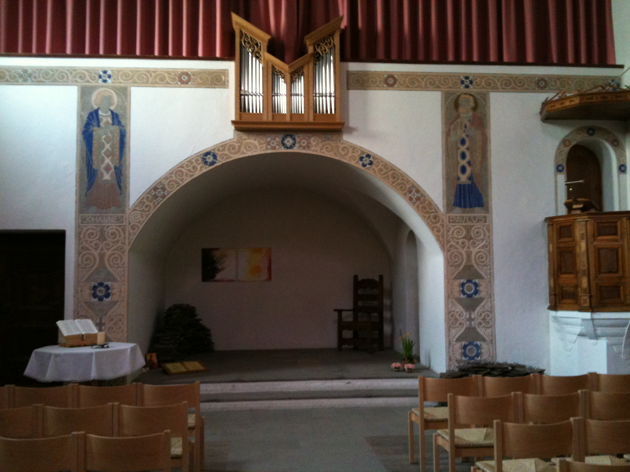 reformierte Kirche in Sils Maria (Kanton Graubünden), Innenansicht